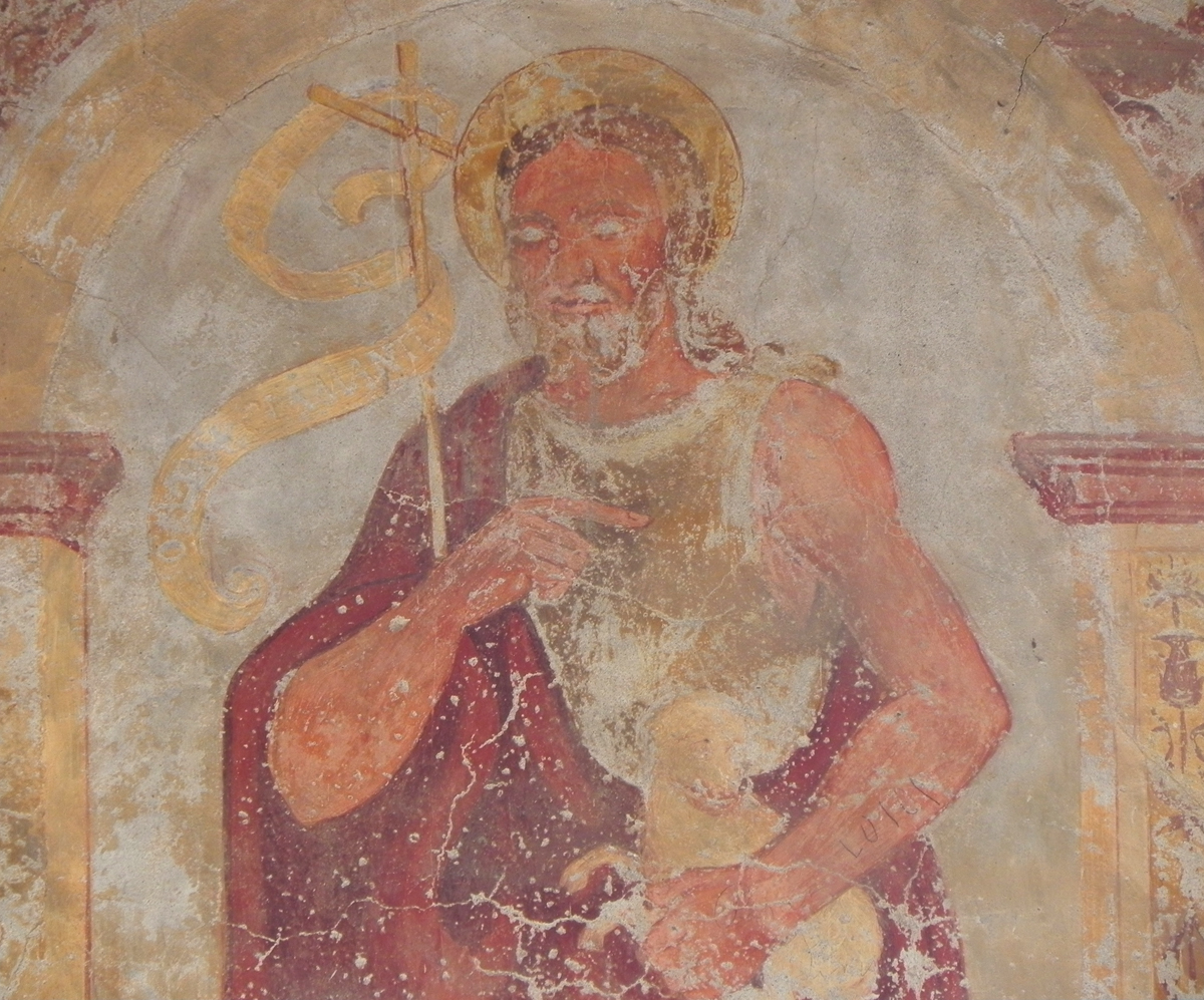 Affresco del portico della Chiesa di San Giovanni a Gorno